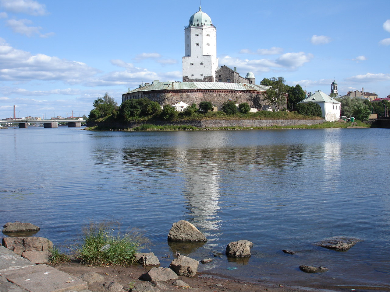 Vyborg, Leningrad Oblast, Russia